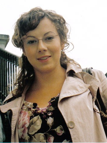 Anna Maria Buczek.